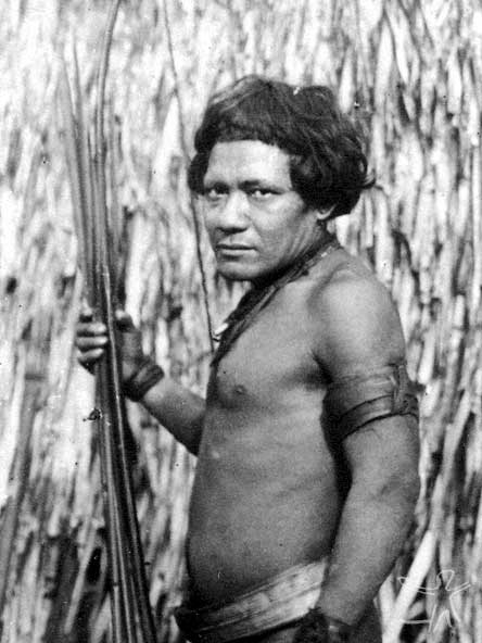 Índio Parintintin, fotografia pertencente ao antigo Museu Plínio Ayrosa (atual Museu de Arqueologia e Etnologia da USP)